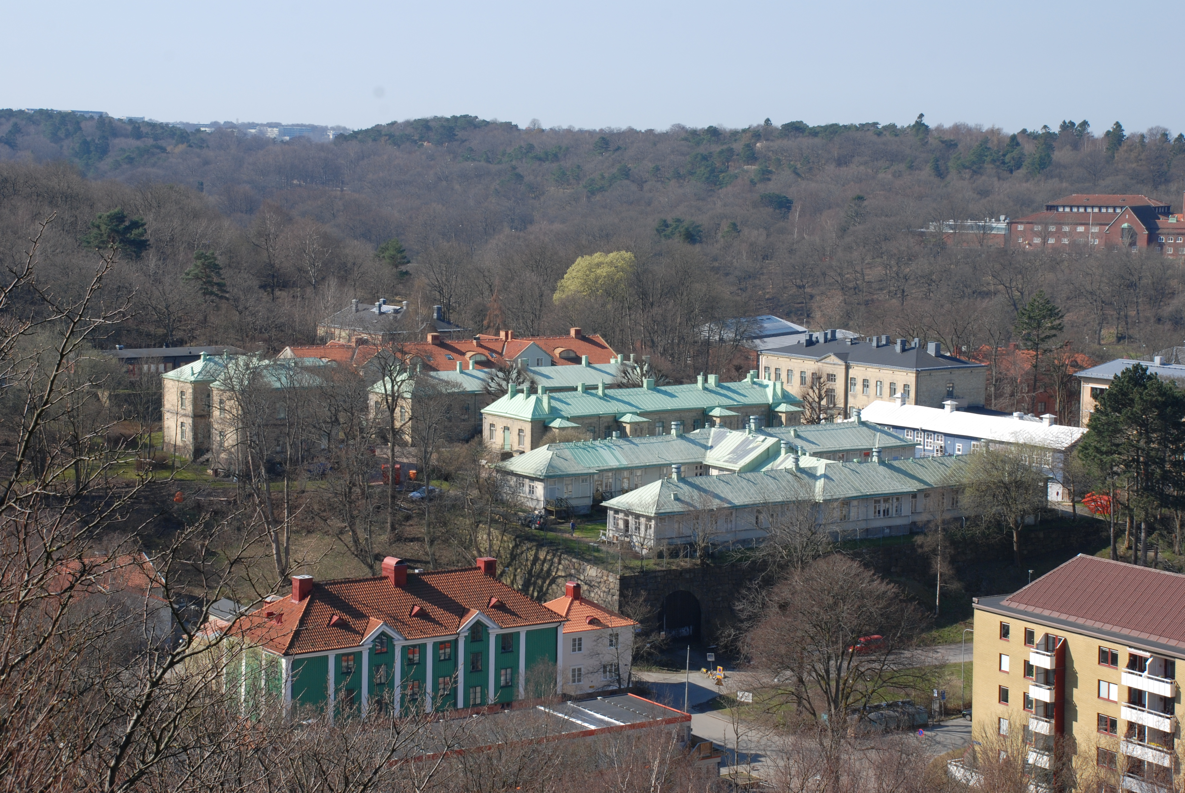 Epidemisjukhuset i stadsdelen Annedal i Göteborg sett från Norra Guldheden.